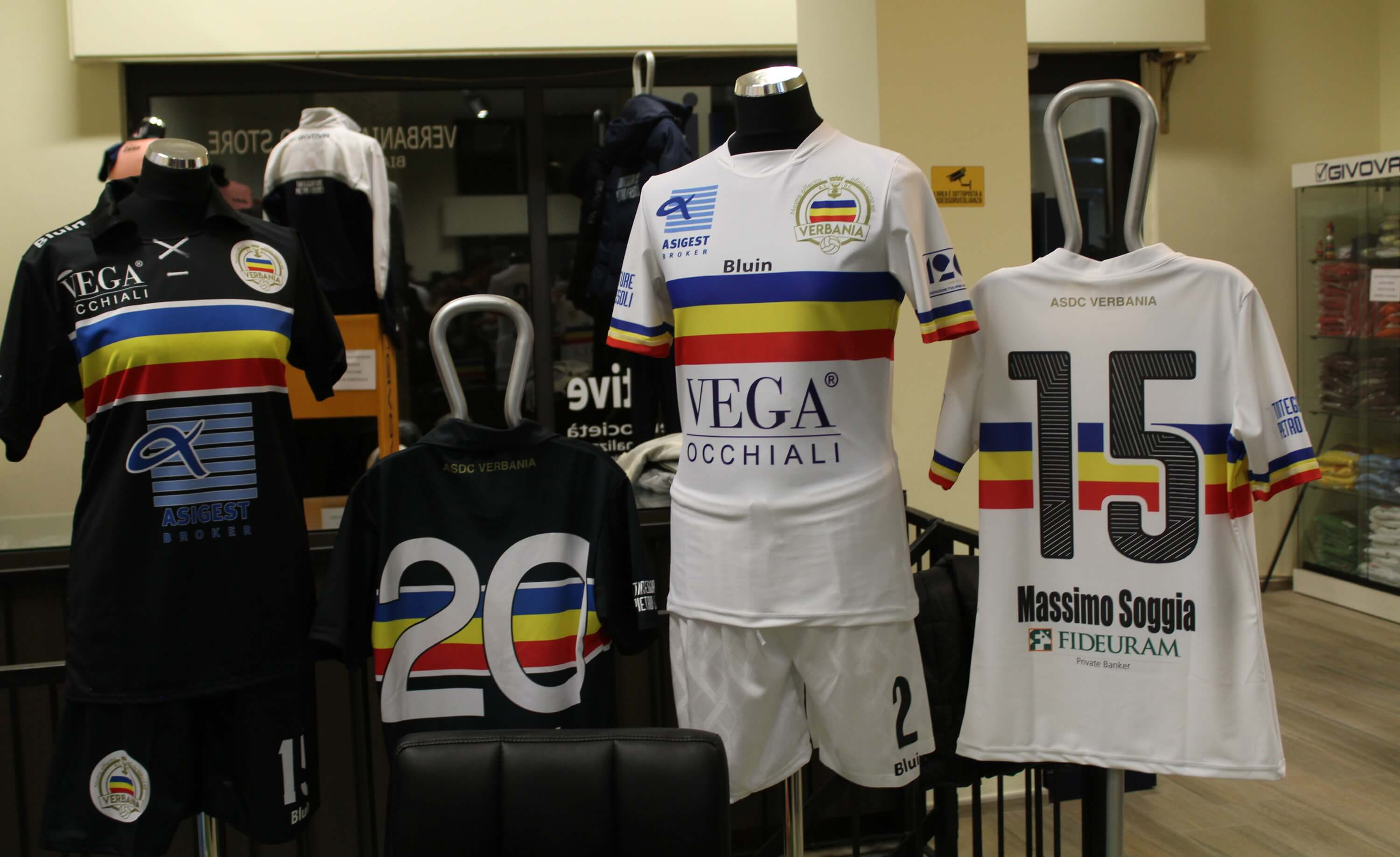 Le maglie dell’Asdc Verbania